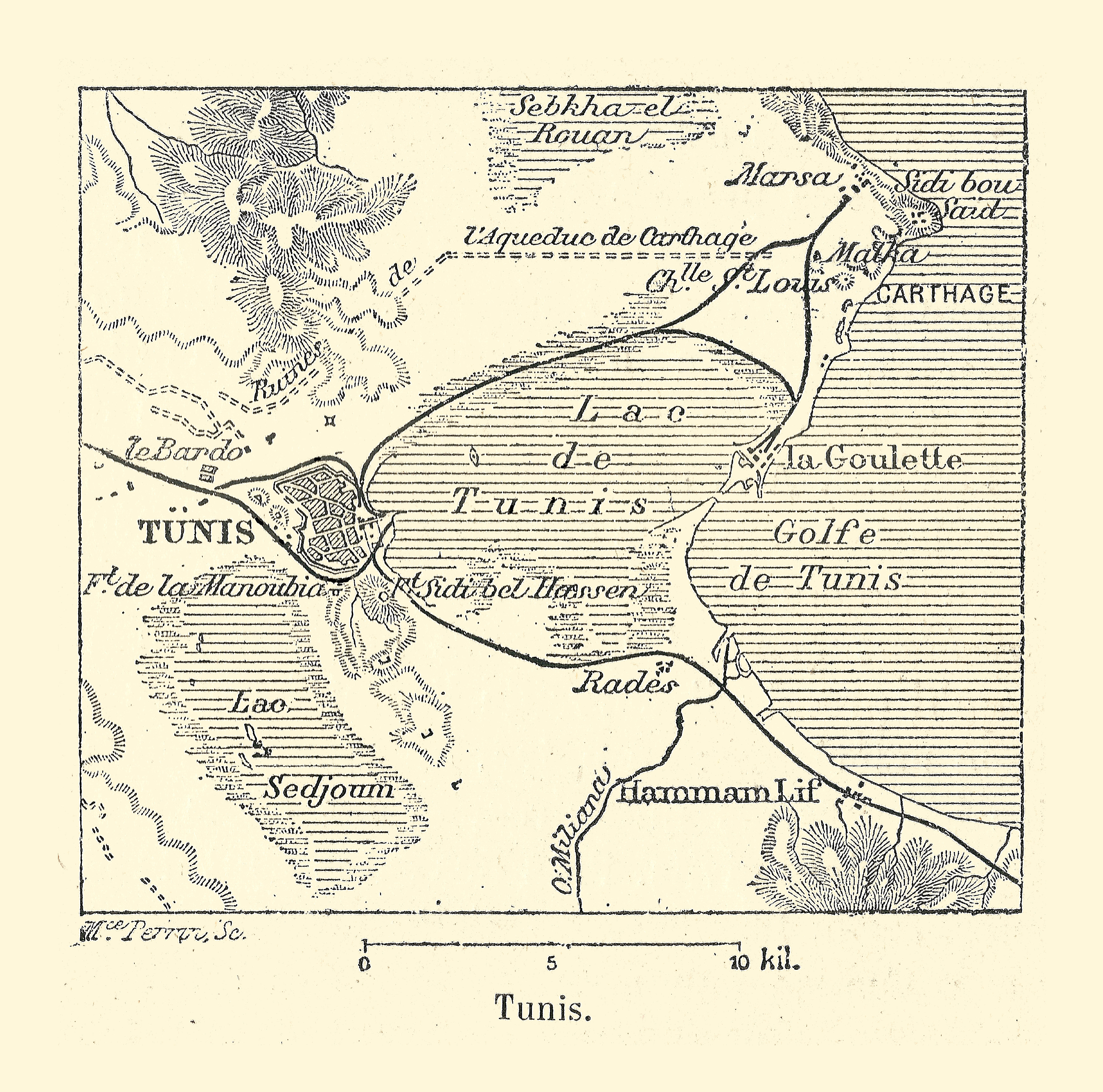 Carte de Franz Schrader